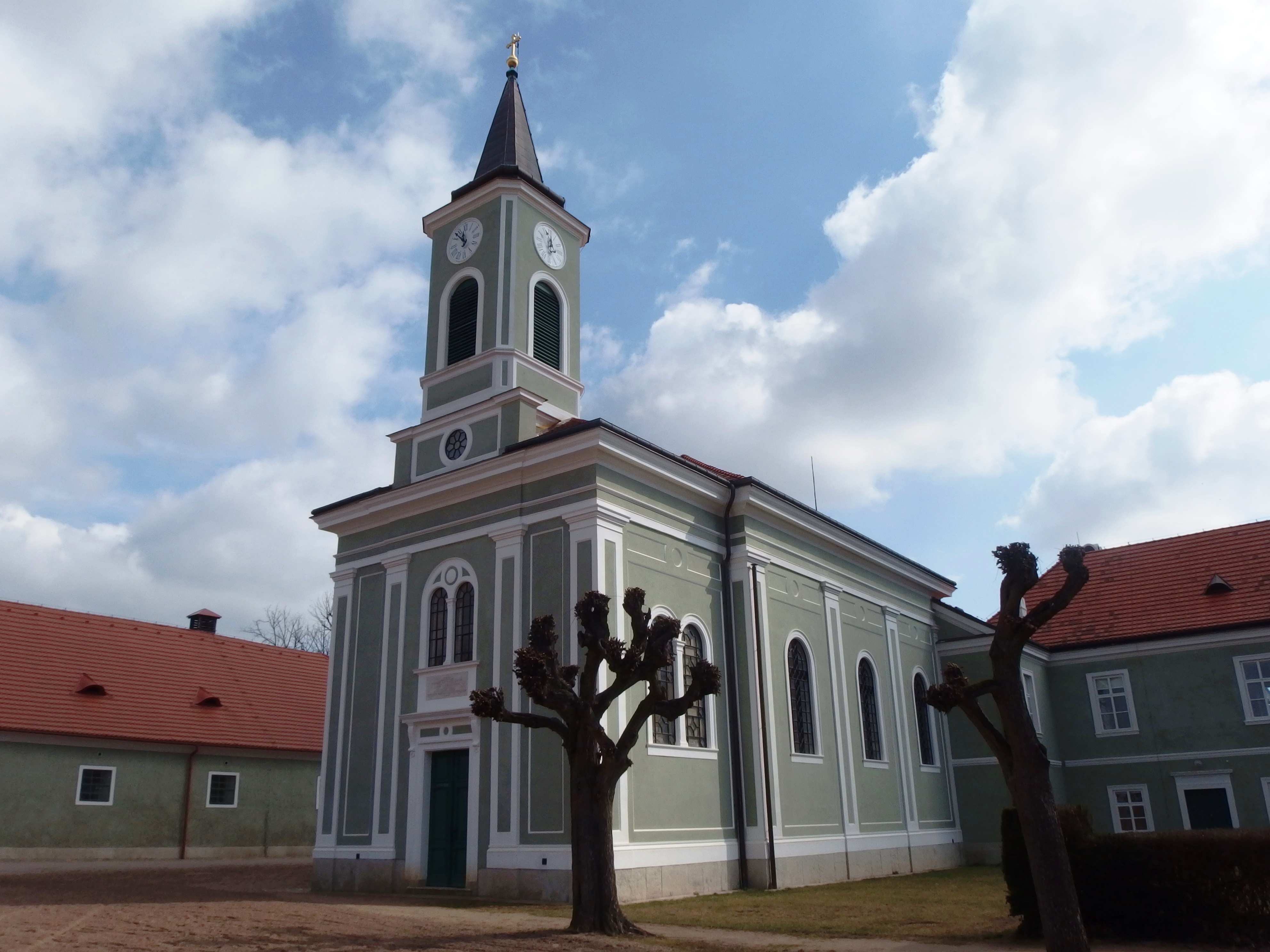 Kladrubský hřebčín, Kladruby nad Labem 1, 2, 3, 13, 23, E34, 42, 44, 46, 47, 48, 55, 58, 70, 92, Selmice 1, 3, 4, 5, 6, 40, 55, 99, Hlavečník, Semín, Kladruby nad Labem.